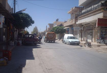 السوق